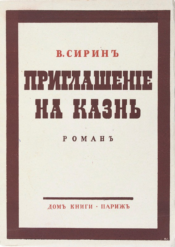 Первое издание романа В. Набокова "Приглашение на казнь", 1938, Париж